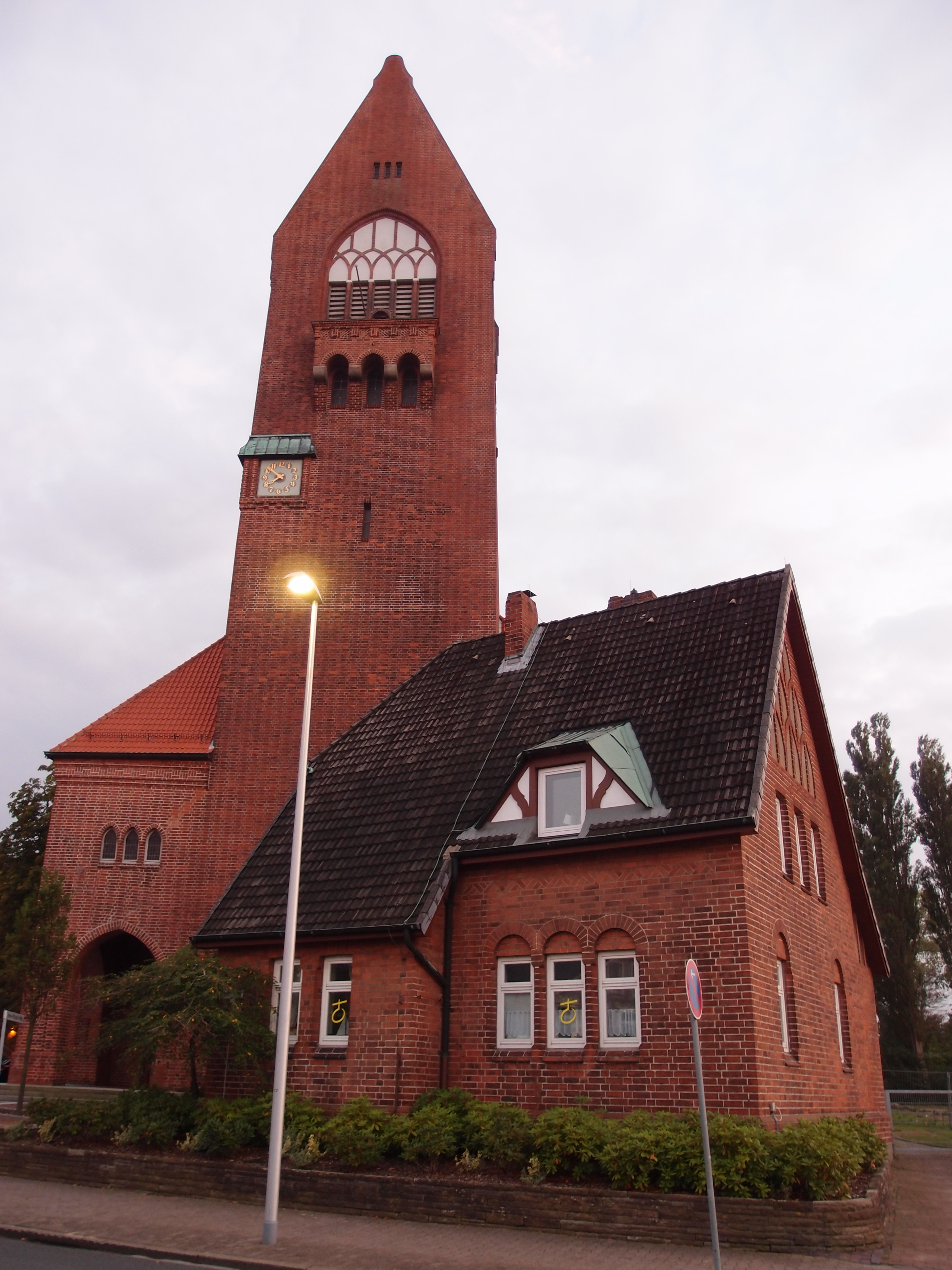 Cuxhaven Kirche St. Petri Ansicht von Norden